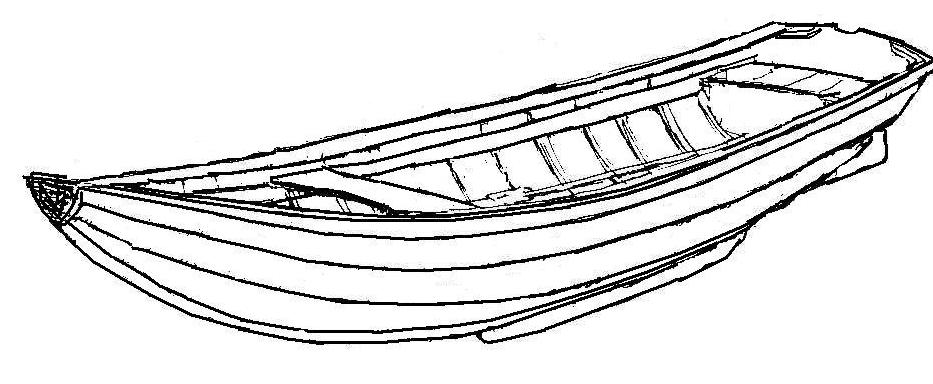 eigen tek.